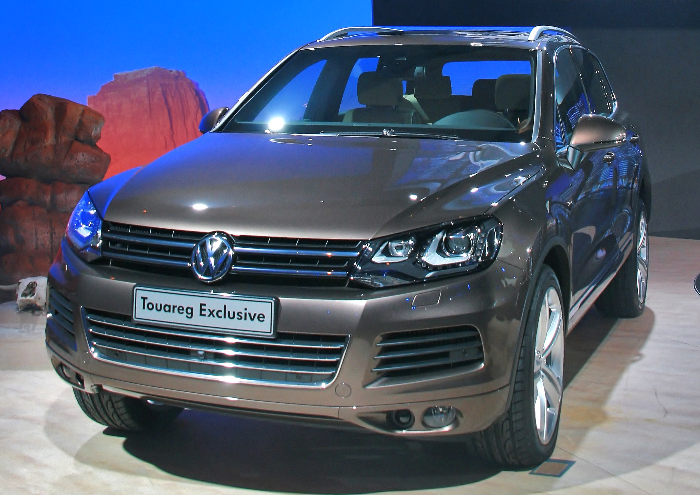 VW Touareg 2010 2. Generation